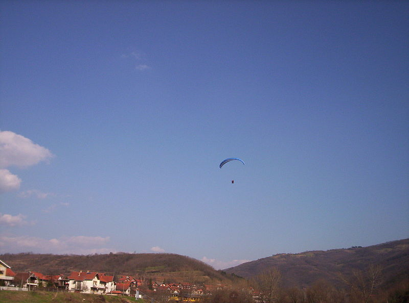 Параглајдери из околине због повољних ветрова користе брдско-планинску околину Власотинца за полетање.